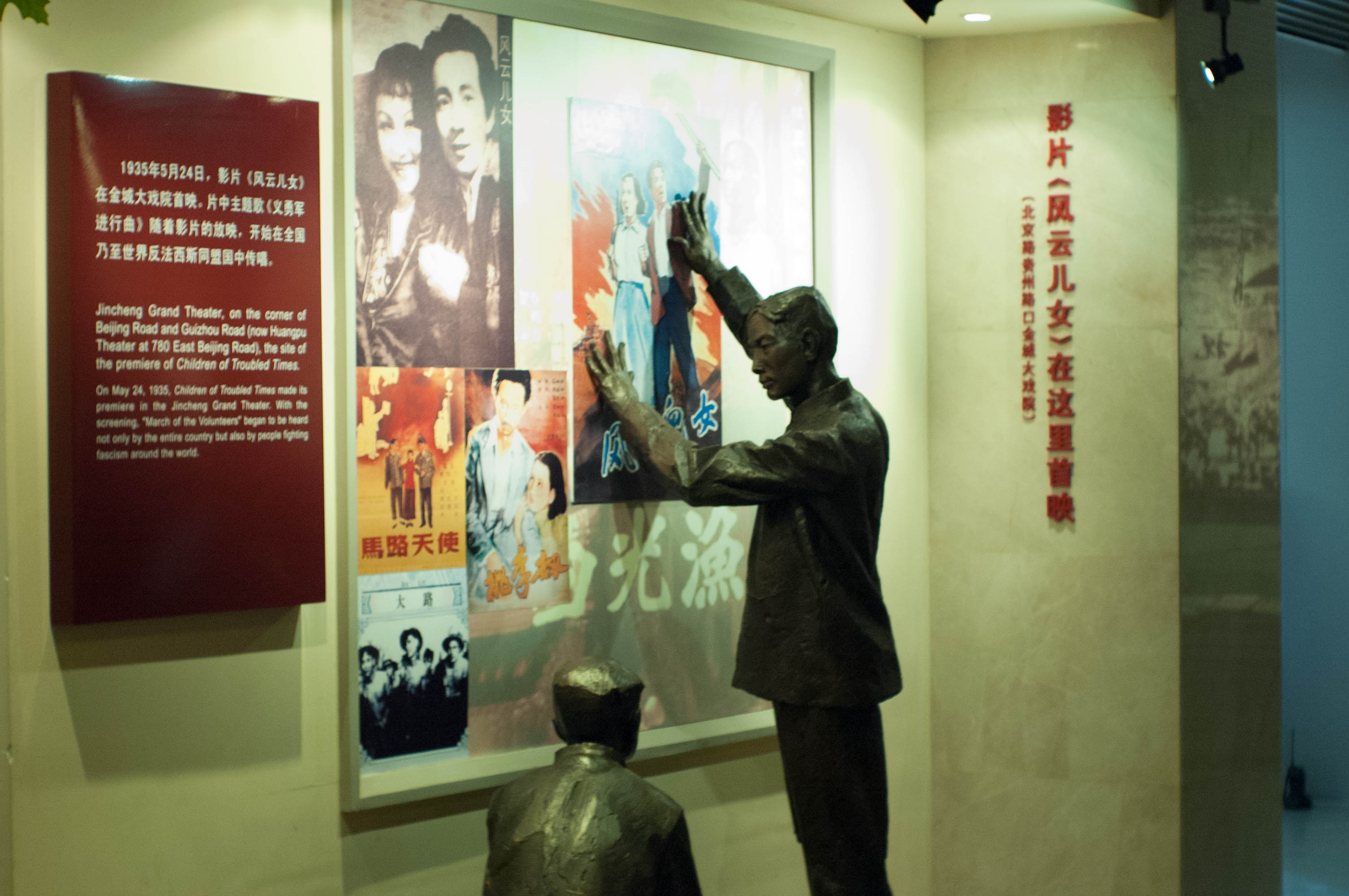 中文（中国大陆）: 国歌展示馆-风云儿女